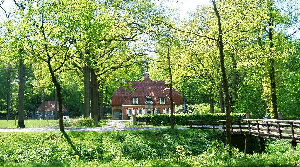 Historische landgoed Slotplaats in Bakkeveen